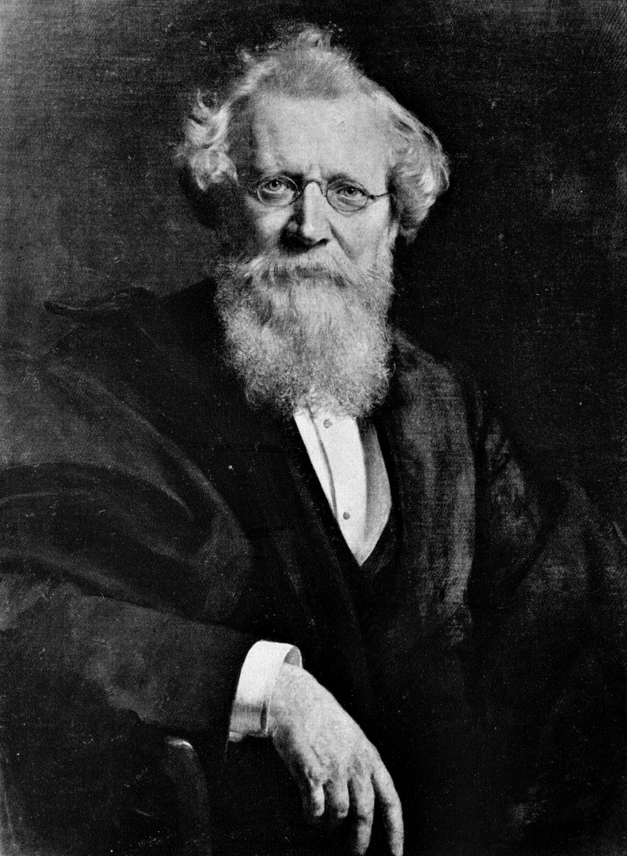 August Wilhelm von Hofmann (1818-1892), chemist; 1890